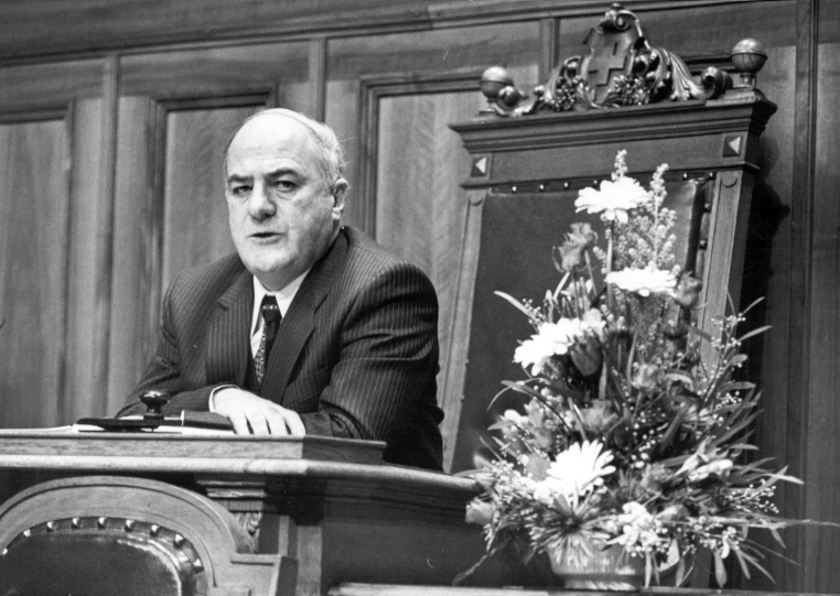 Jost Dillier, Schweizer Politiker, auf dem Foto als Ständeratspräsident